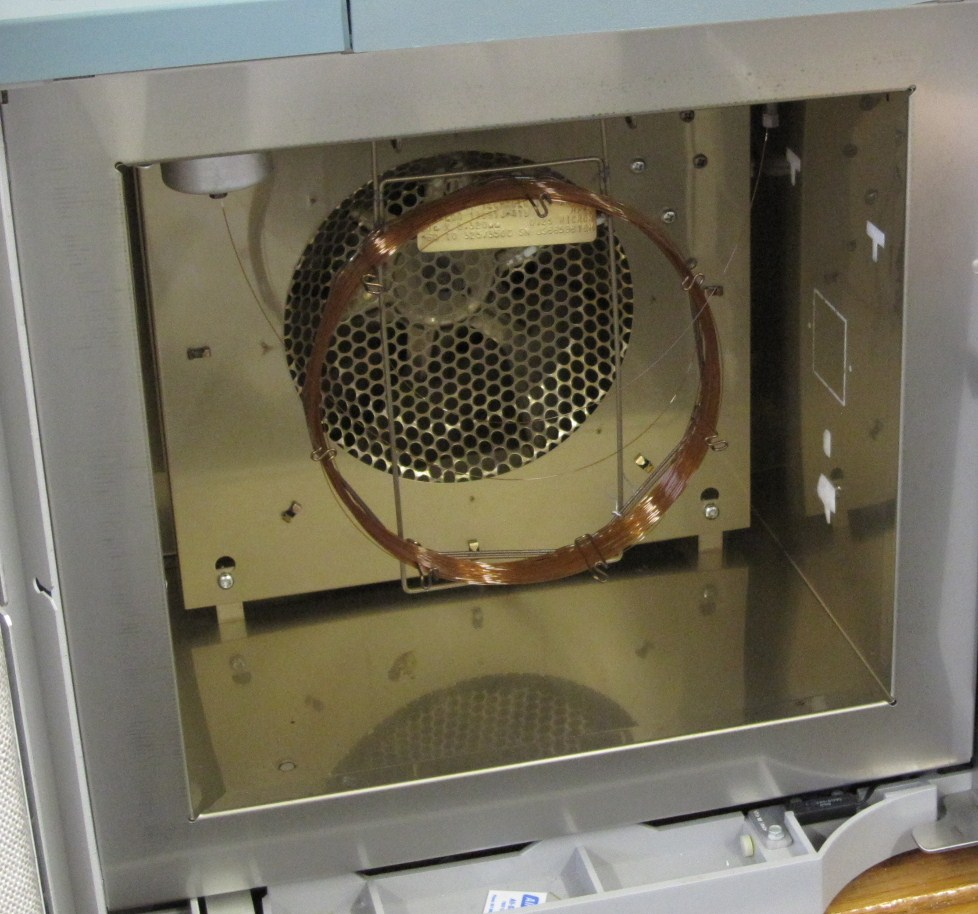 Een kolom van een gaschromatograaf in de labzaal universiteit Leiden